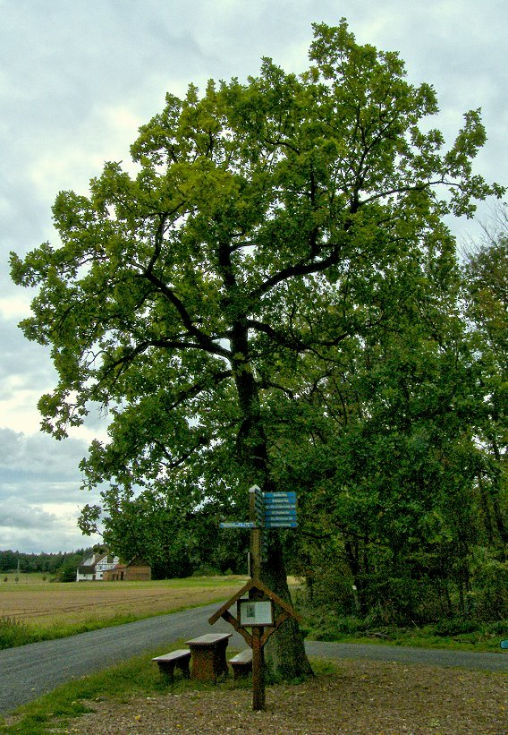 Die heutige Franzoseneiche (2008)- Im Hintergrund die „Waldschmiede“